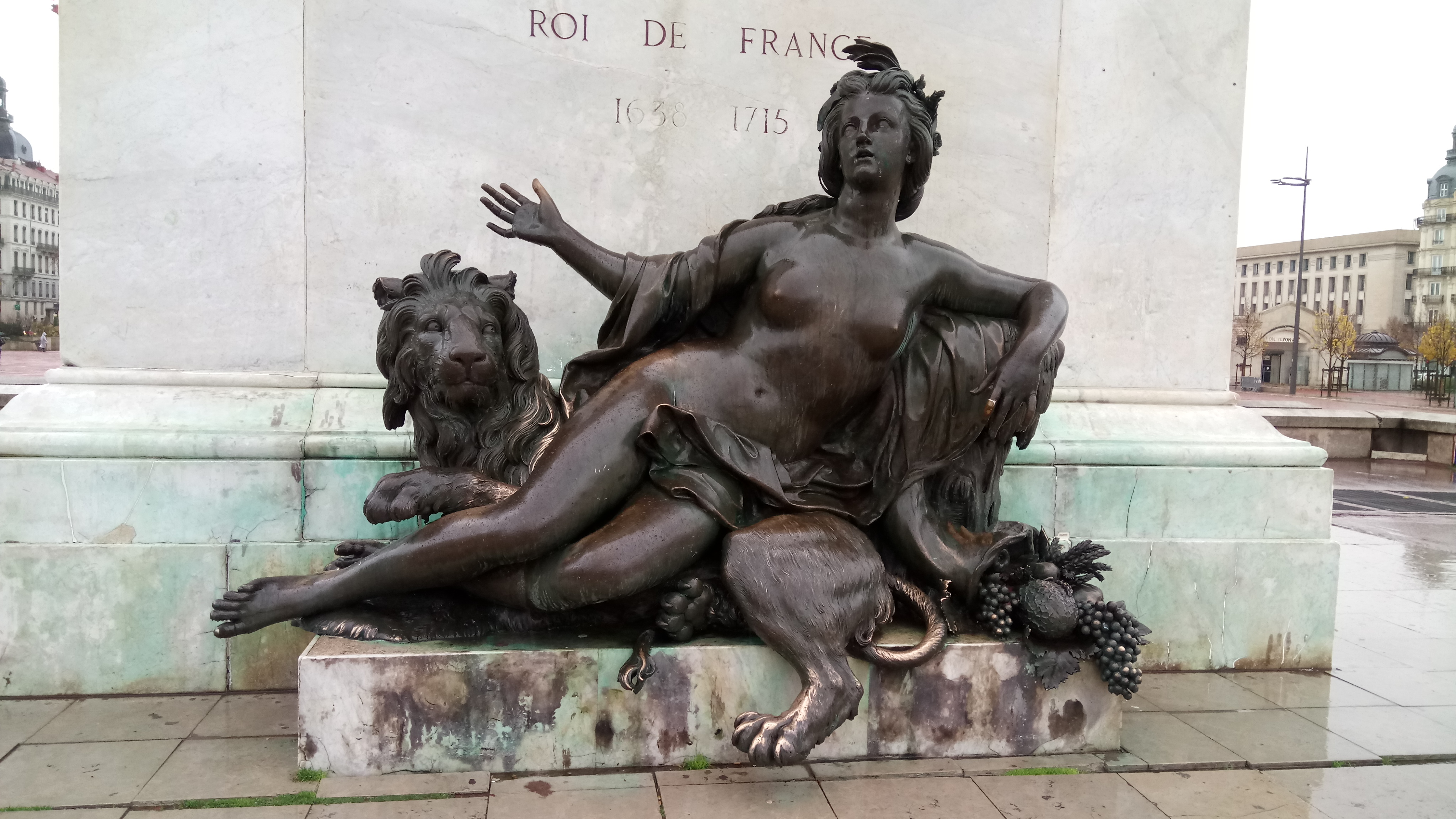 Allégorie de la Saône réalisé par Nicolas Coustou en 1720, à senestre du piédestal du Statue équestre de Louis XIV